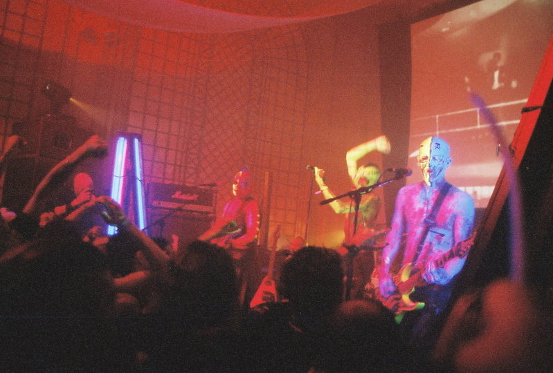 Punish Yourself @ Dark Omen II Festival - Château de Vaux-le-Pénil